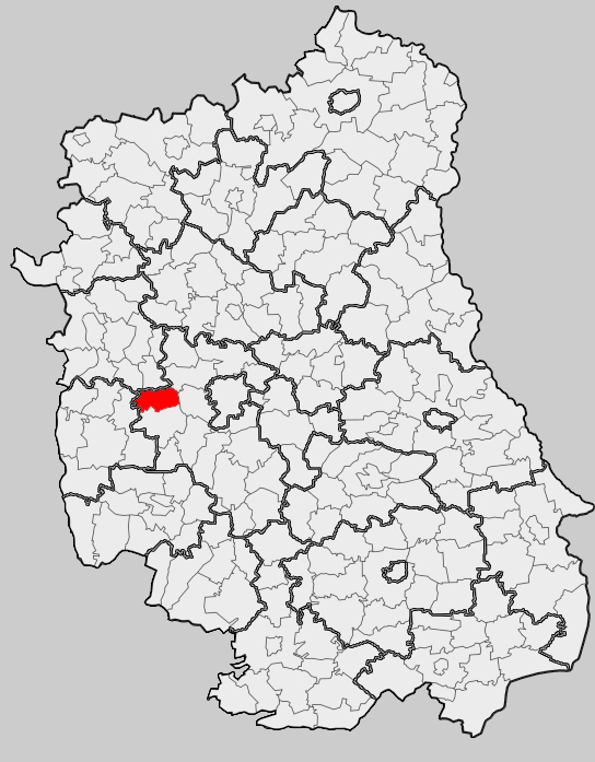 Map of gmina Wojciechów, Lublin county, Lublin voivodship Mapa gminy Wojciechów, powiat lubelski, województwo lubelskie